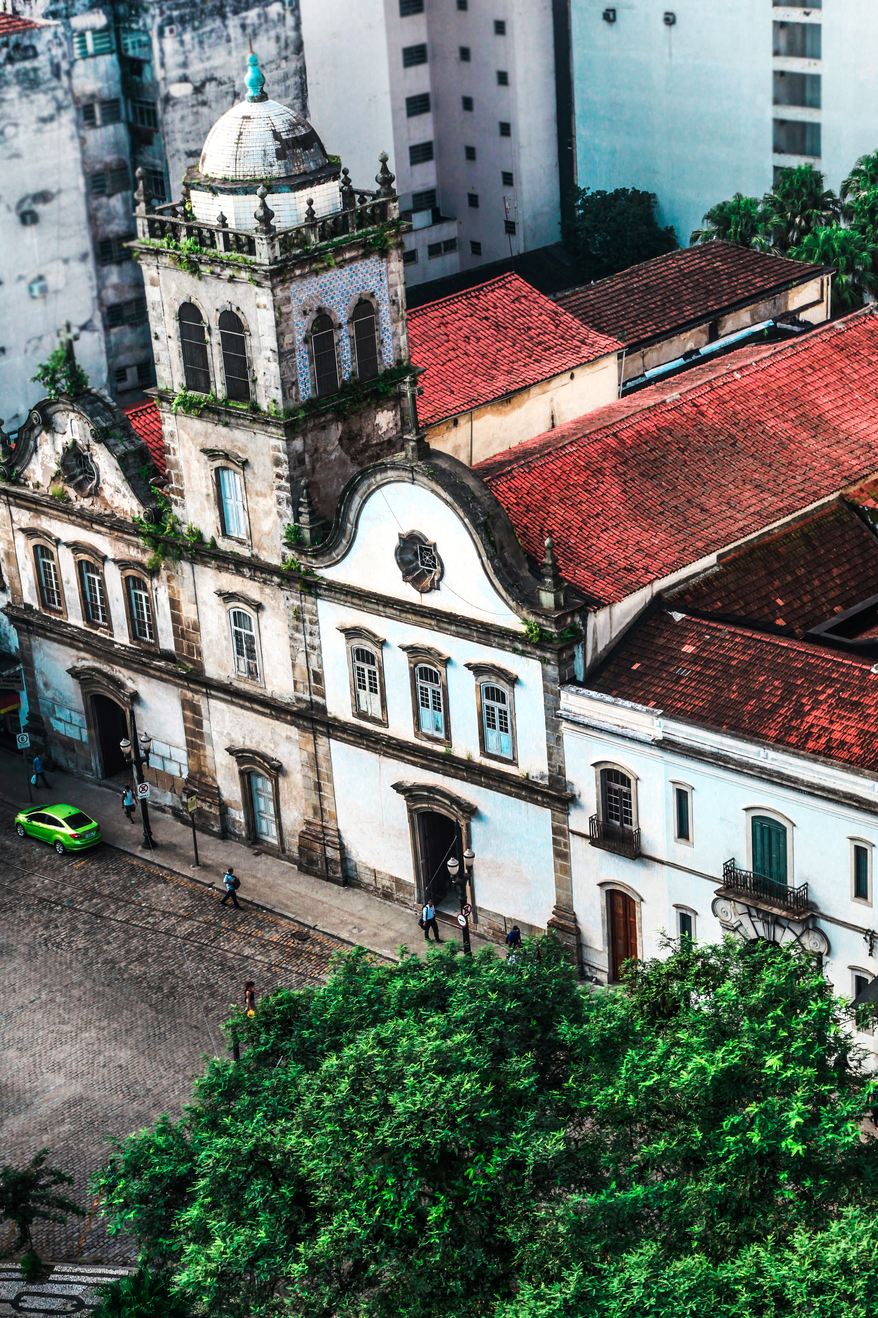 O Conjunto do Carmo é formado pela Igreja da Venerável Ordem Terceira do Carmo, datada de 1710, com altares de madeira em estilo rococó, e pela Igreja e Convento dos Freis Carmelitas, datada de 1599, com destaque para o presbitério com cadeiras em jacarandá e, no interior, telas de Benedito Calixto. A duas igrejas são unidas por uma torre com campanário e fachada revestida de azulejos marianos do século XIX.